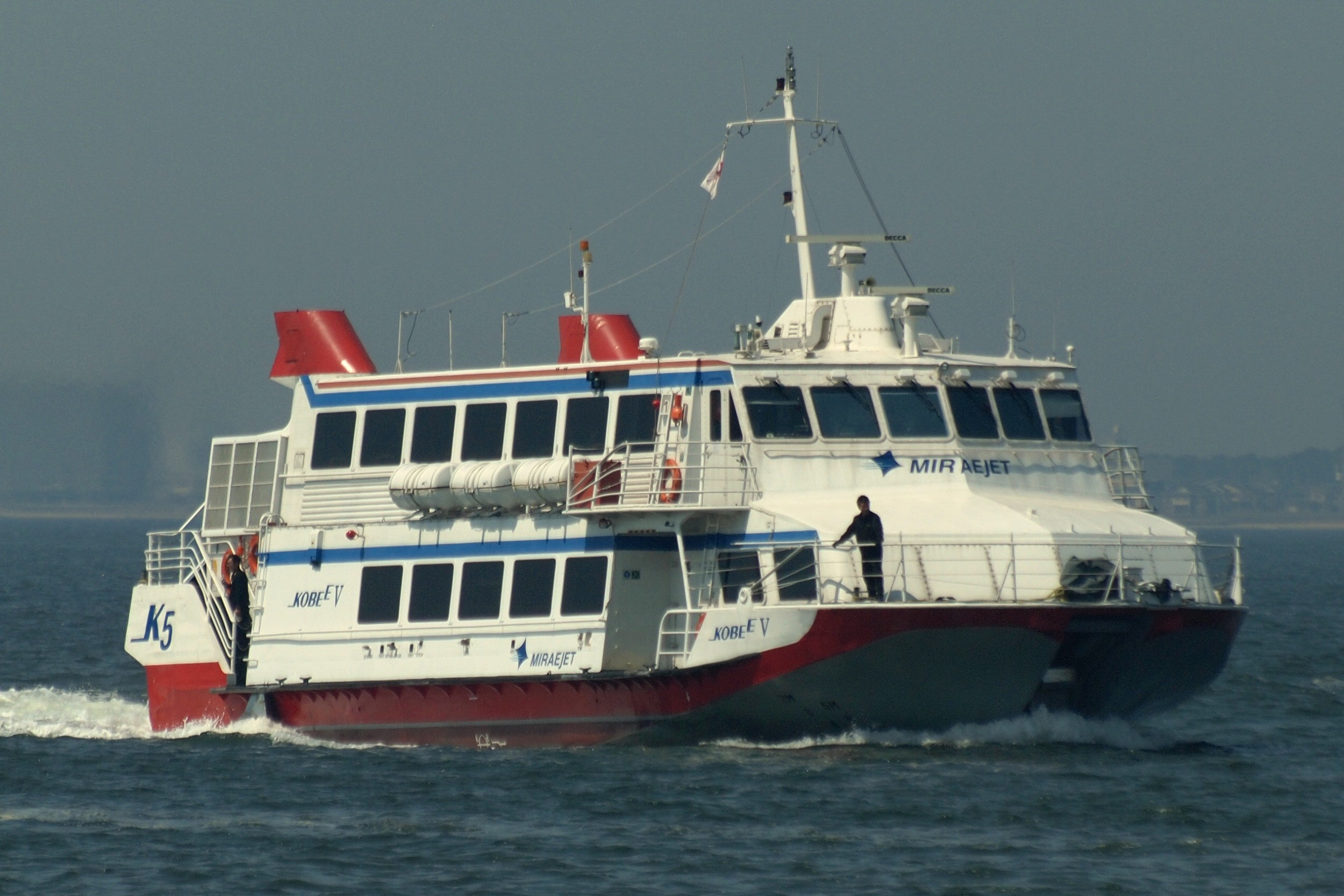 韓国・未来高速の高速船「コビーⅤ」 IMO Number: 7932903 BUILD: 1978